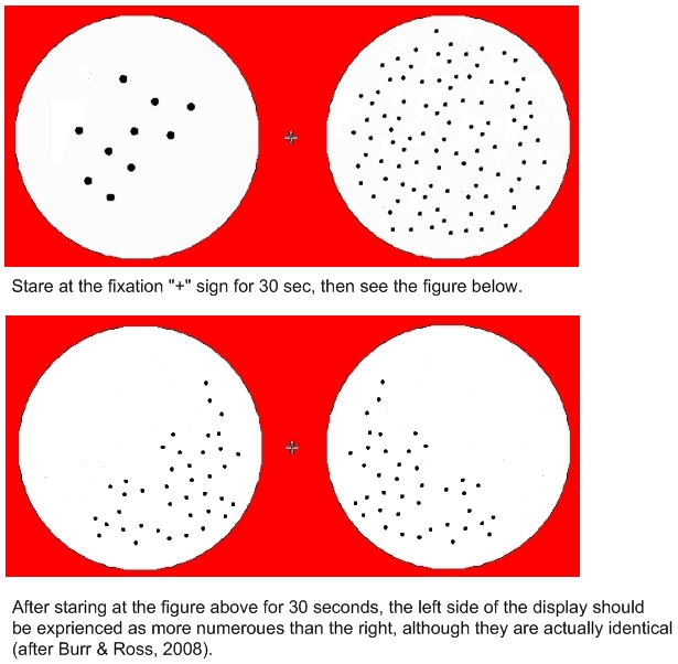 Numerosit adaptation